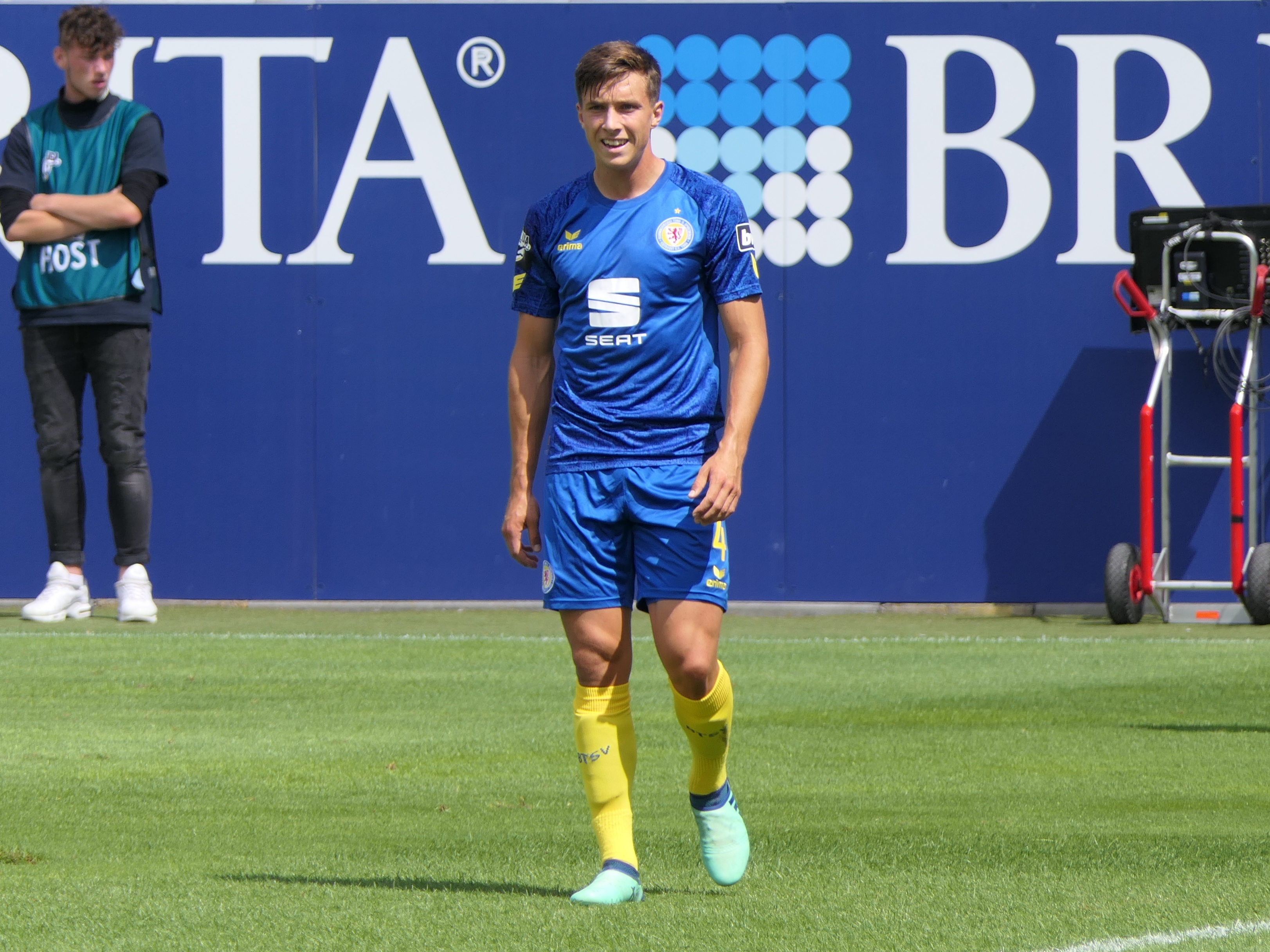 Der Fussballprofi Malte Amundsen im Trikot von Eintracht Braunschweig beim Auswärtsspiel beim SV Wehen Wiesbaden am 11.08.2018.